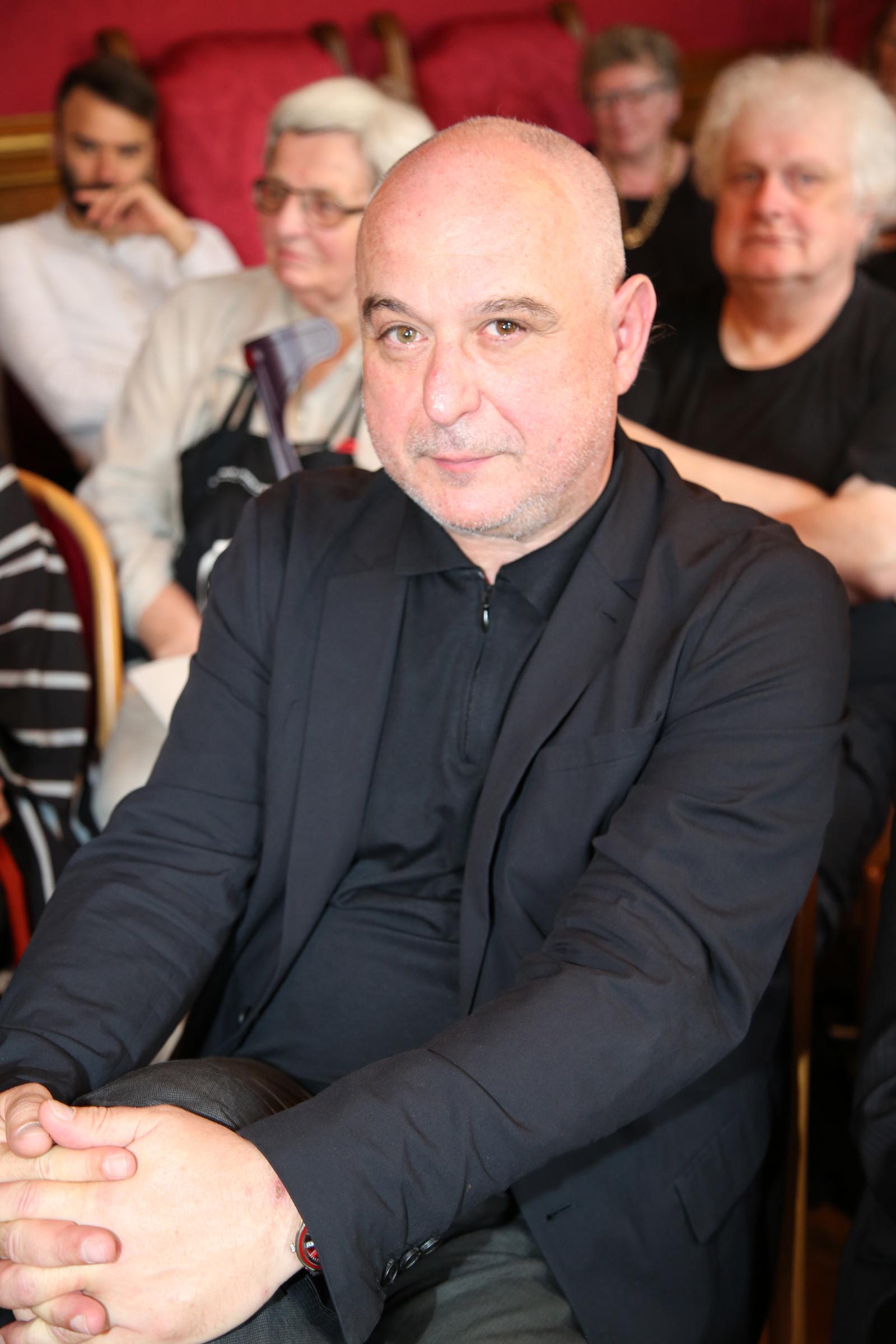 Kastberger_Klaus-5786